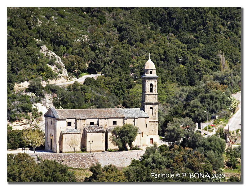 Farinole (Corse) - Église St-Côme et St-Damien